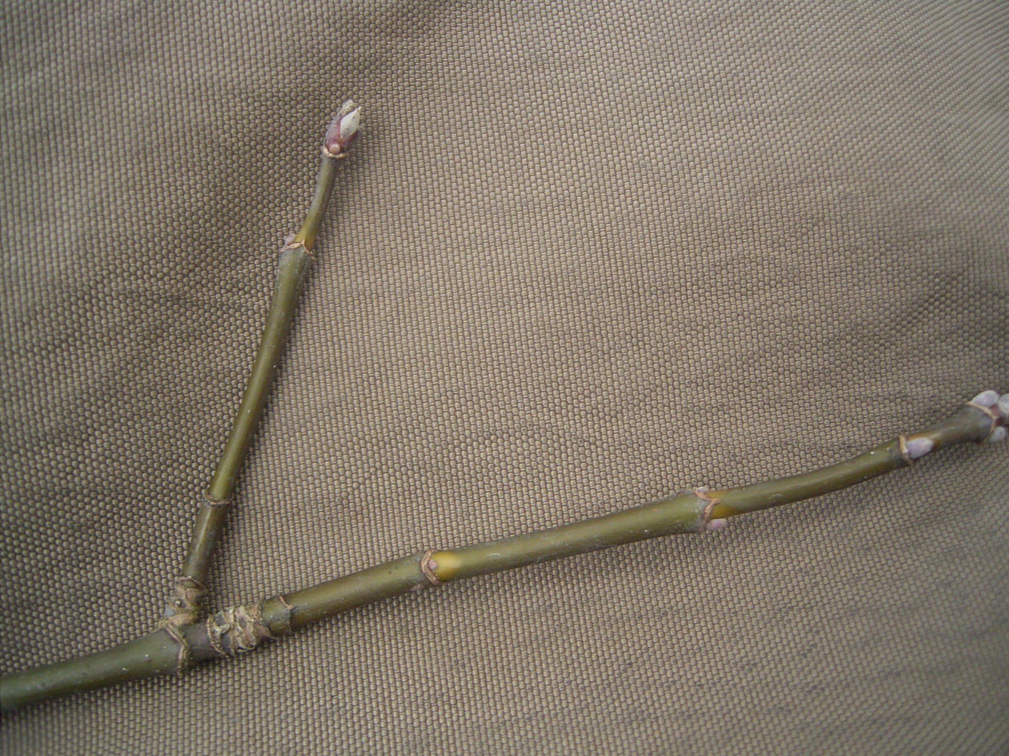 Deze foto toont enkele bladknoppen van de Vederesdoorn. Ik nam deze foto op 2 maart 2006 in het heempark in Delft. This picture shows some leafbuds of acer negundo.